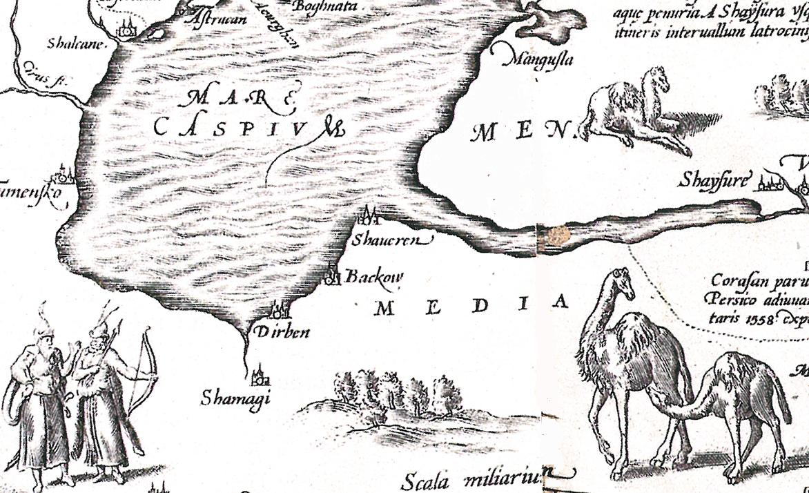 Россия Московия Тартария. Англо-голландская карта 1562 года (Лондон) с исправлениями 1598 года (Антверпен). Побережье Каспийского моря с указанием Дербента (Dirben), Шемахи (Shemagi) и Баку (Bakhow)